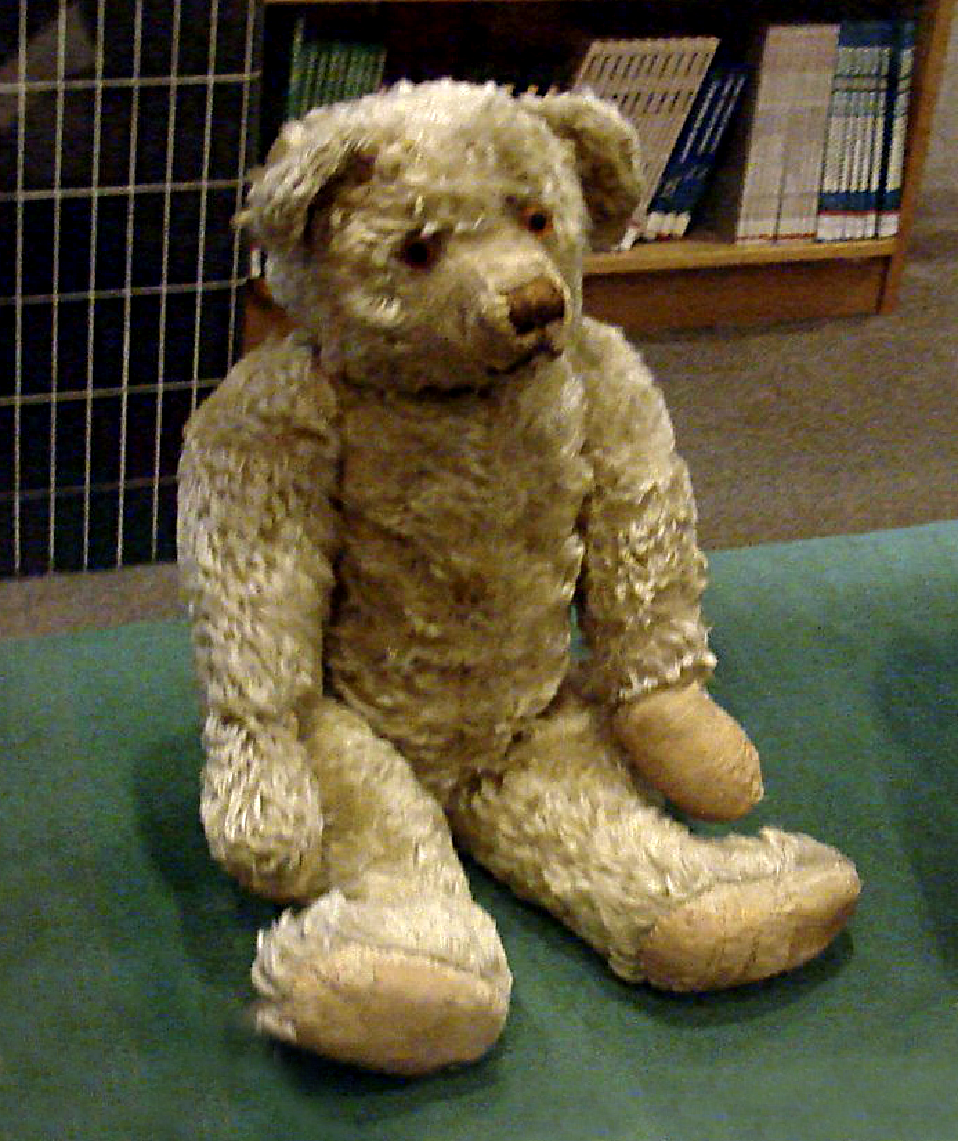 Winnie The Pooh Winnie Original Toys Christopher